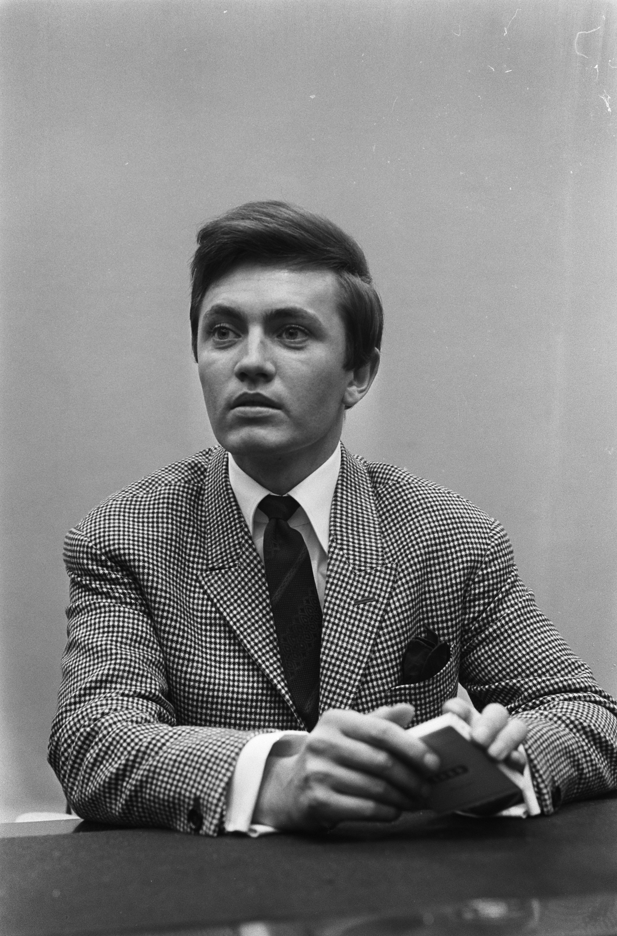 Collectie / Archief : Fotocollectie Anefo Reportage / Serie : [ onbekend ] Beschrijving : Aankomst van de Duitse zanger Rex Gildo op Schiphol Datum : 2 oktober 1964 Locatie : Noord-Holland, Schiphol Trefwoorden : muziek, portretten, zangers Persoonsnaam : Gildo Rex Fotograaf : Pot, Harry / Anefo Auteursrechthebbende : Nationaal Archief Materiaalsoort : Negatief (zwart/wit) Nummer archiefinventaris : bekijk toegang 2.24.01.05 Bestanddeelnummer : 916-9594